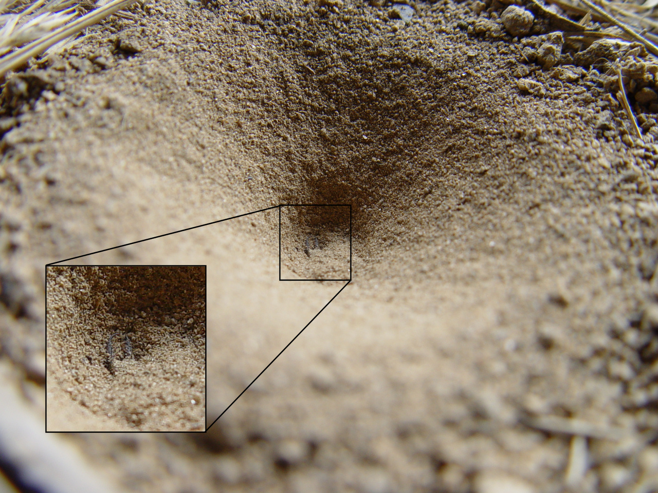 Waiting for dinner.